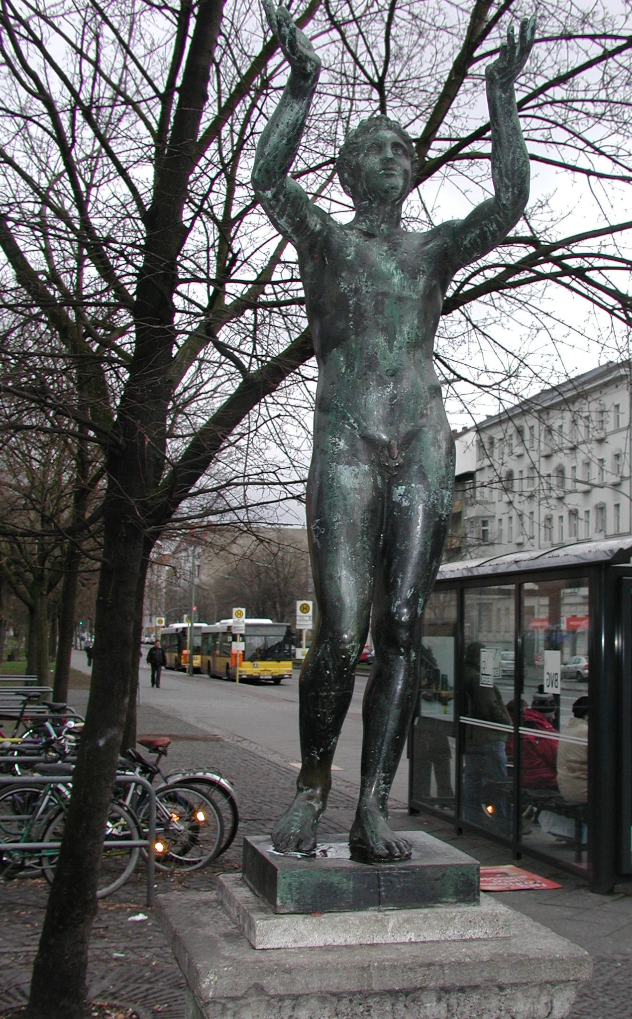 (Nachguss einer antiken) Bronze-Skulptur "Adorant" am Leopoldplatz, Berlin-Wedding